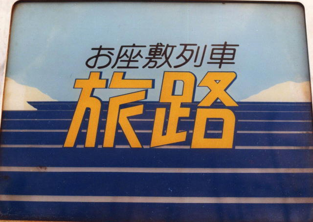 12系お座敷列車「旅路」のヘッドマーク